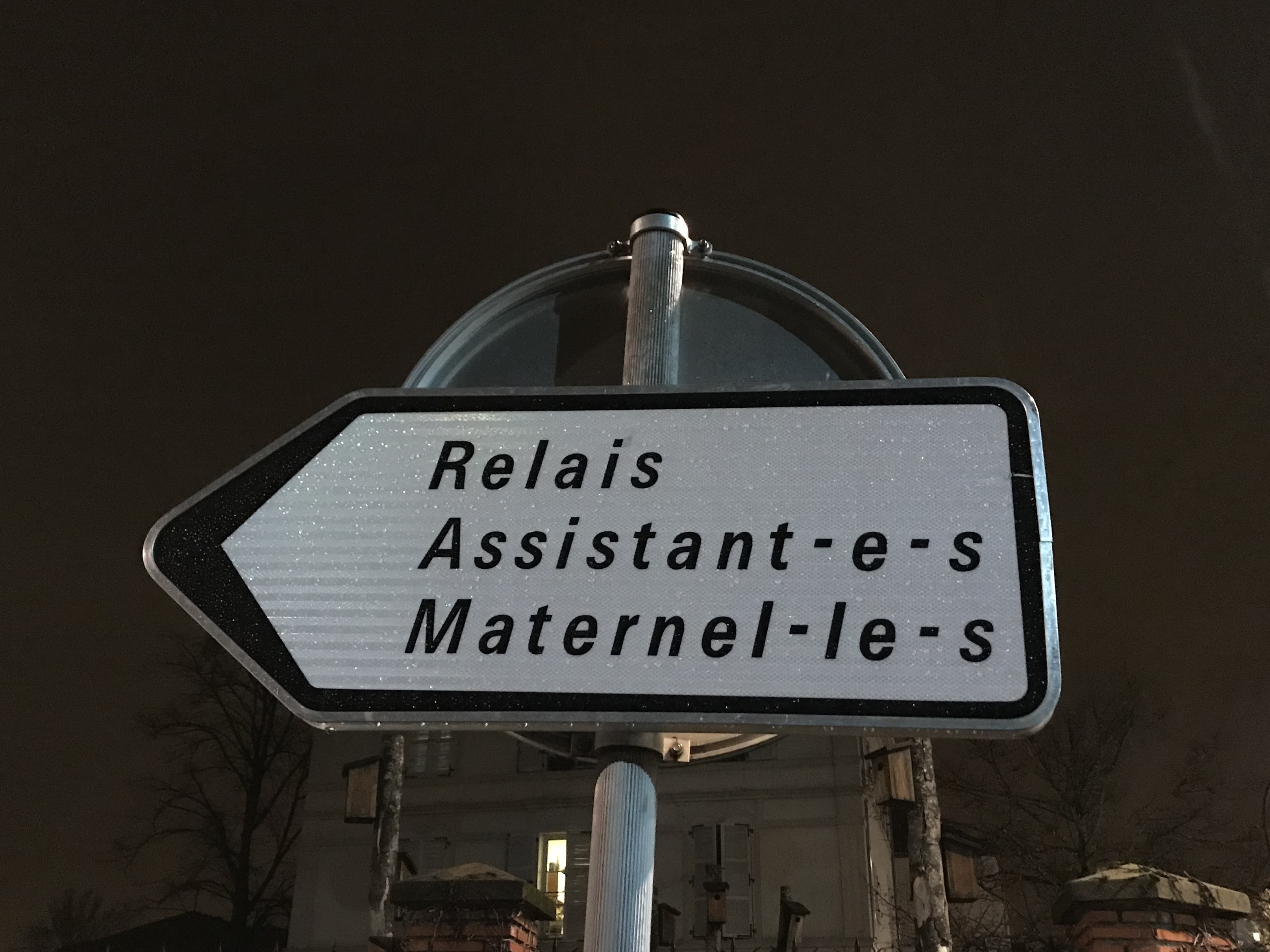 Panneau "Relais Assistant•e•s Maternel•le•s", rue Dalayrac, Fontenay-sous-Bois.